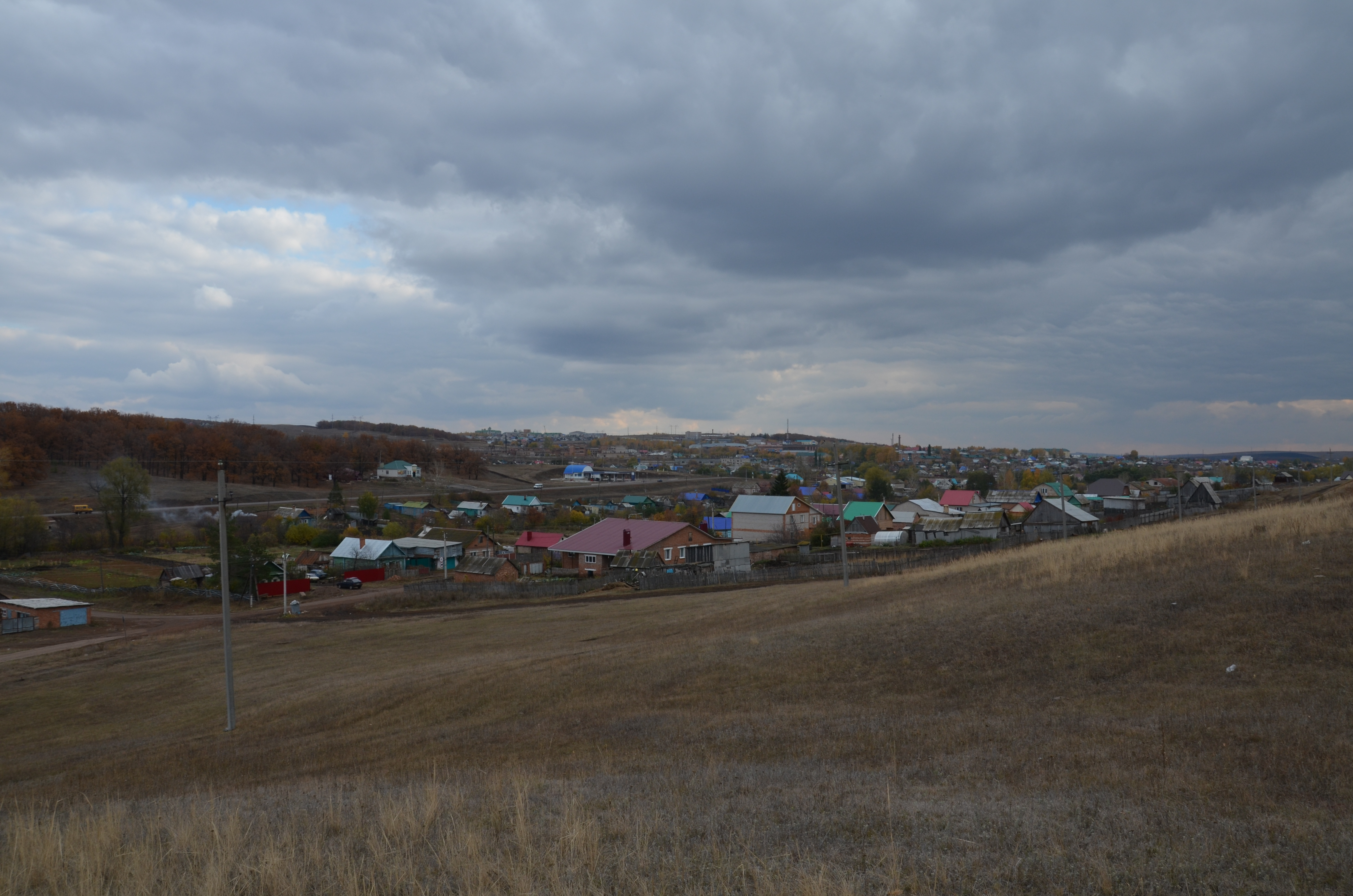 (Республика Башкортостан, Кумертау, село ермолаевка)